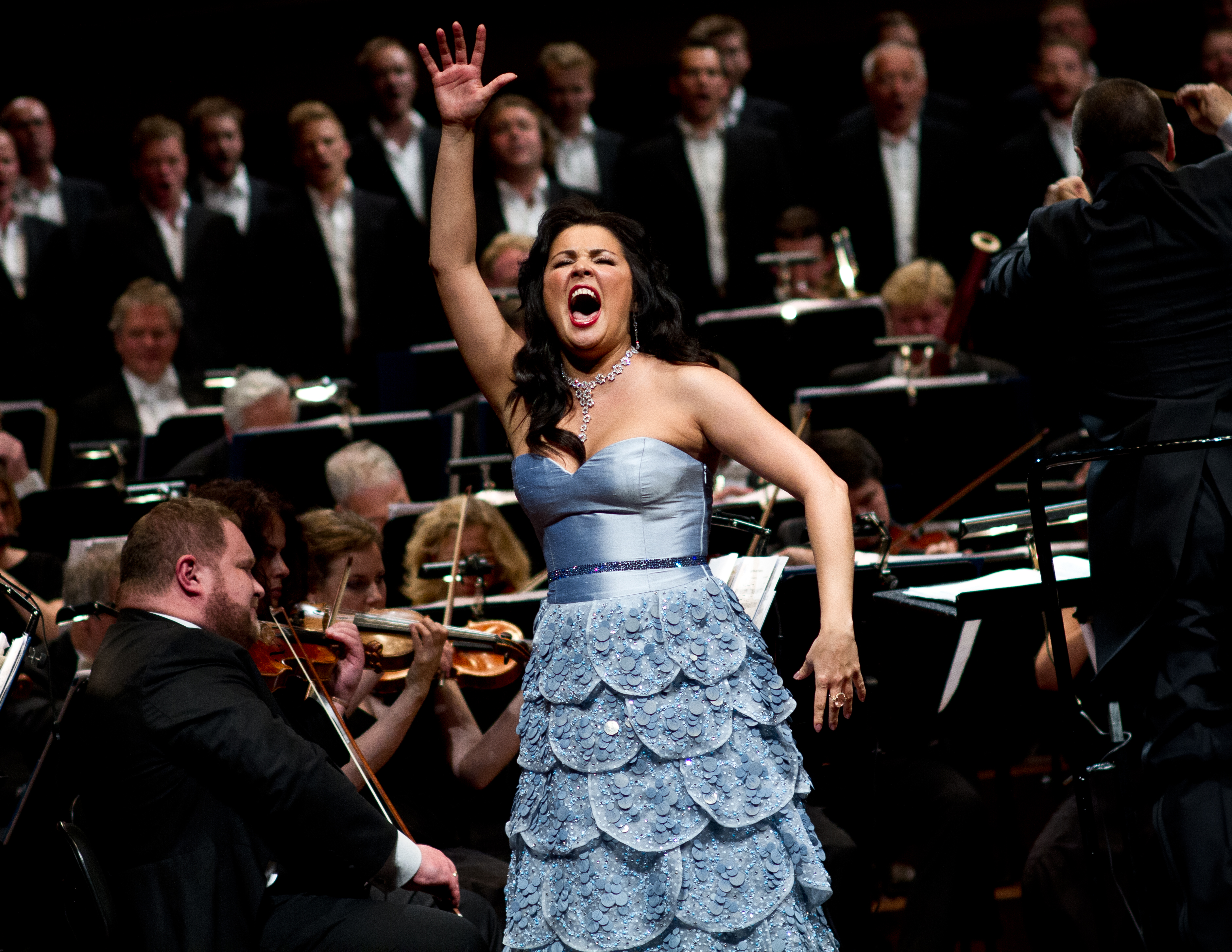 Russisk/østrigsk sopran Anna Netrebko.